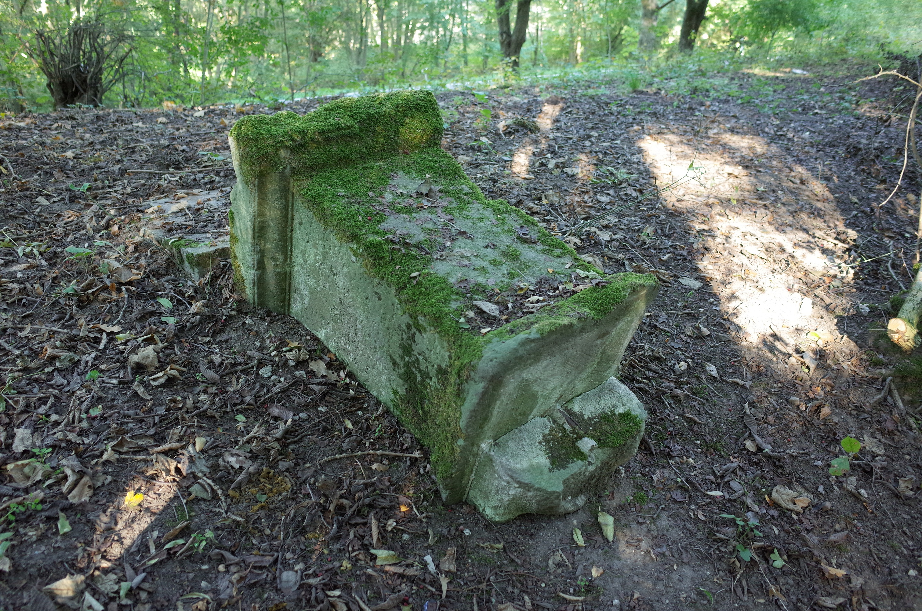 Oranienbaum-Wörlitz, Ortsteil Vockerode, Postament auf dem Vasenwall (Baudenkmal im Denkmalverzeichniss Sachsen-Anhalt, Erfassungsnummer: 094 40595 000 000 000 000 [1])